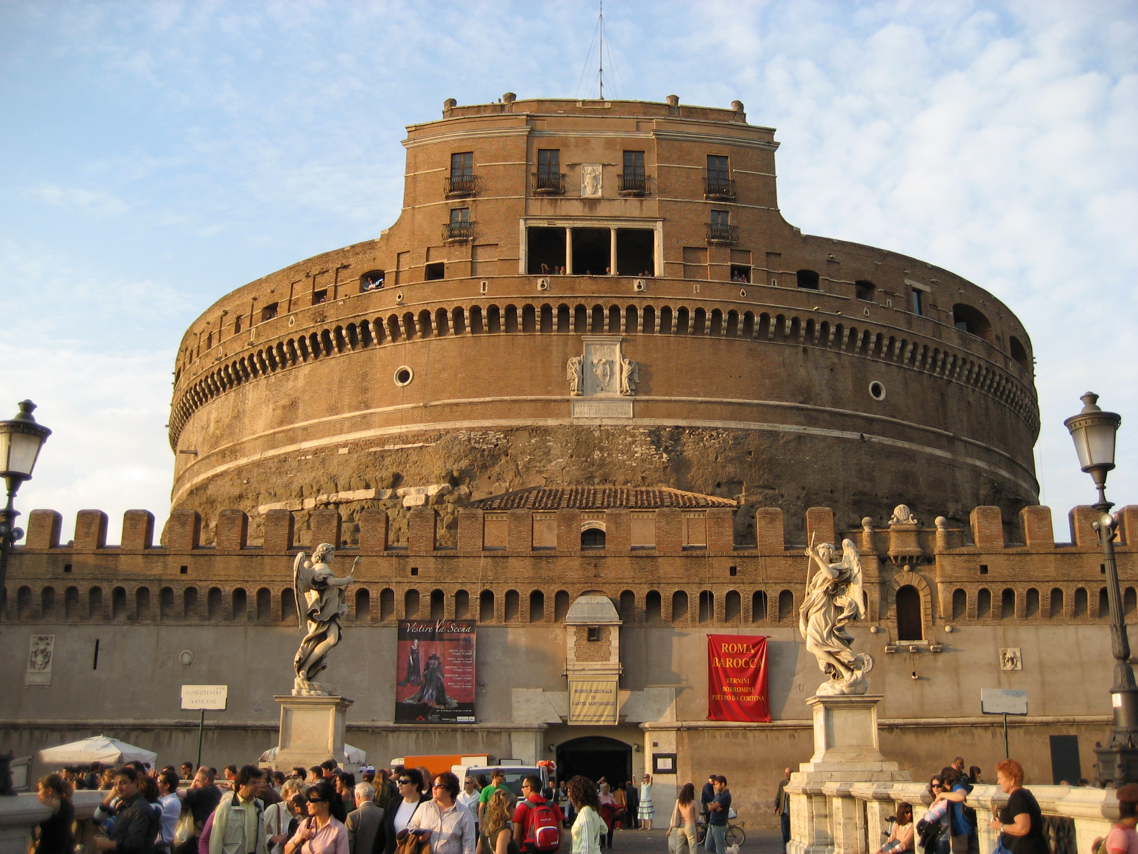 Castel Sant'Angelo (Roma).